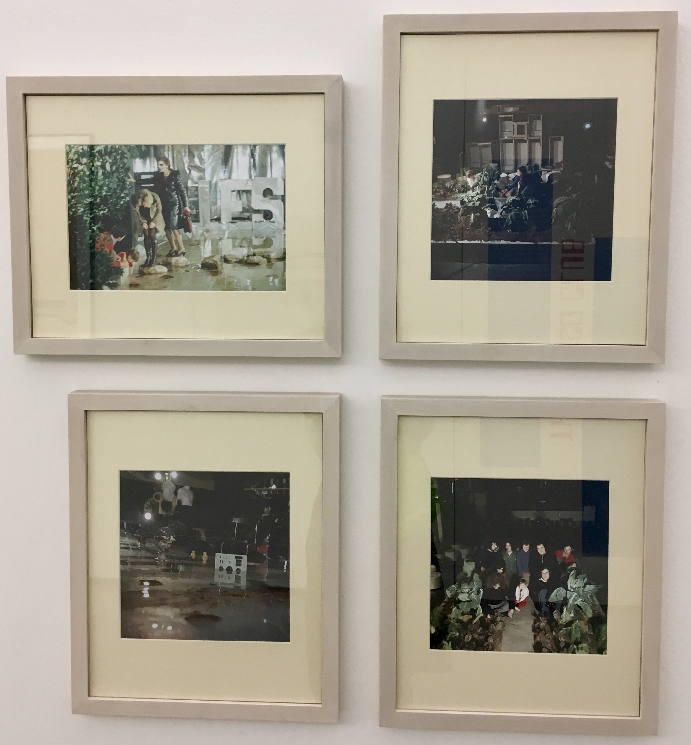 Gruppo 9999. S-Space Mondial Festival